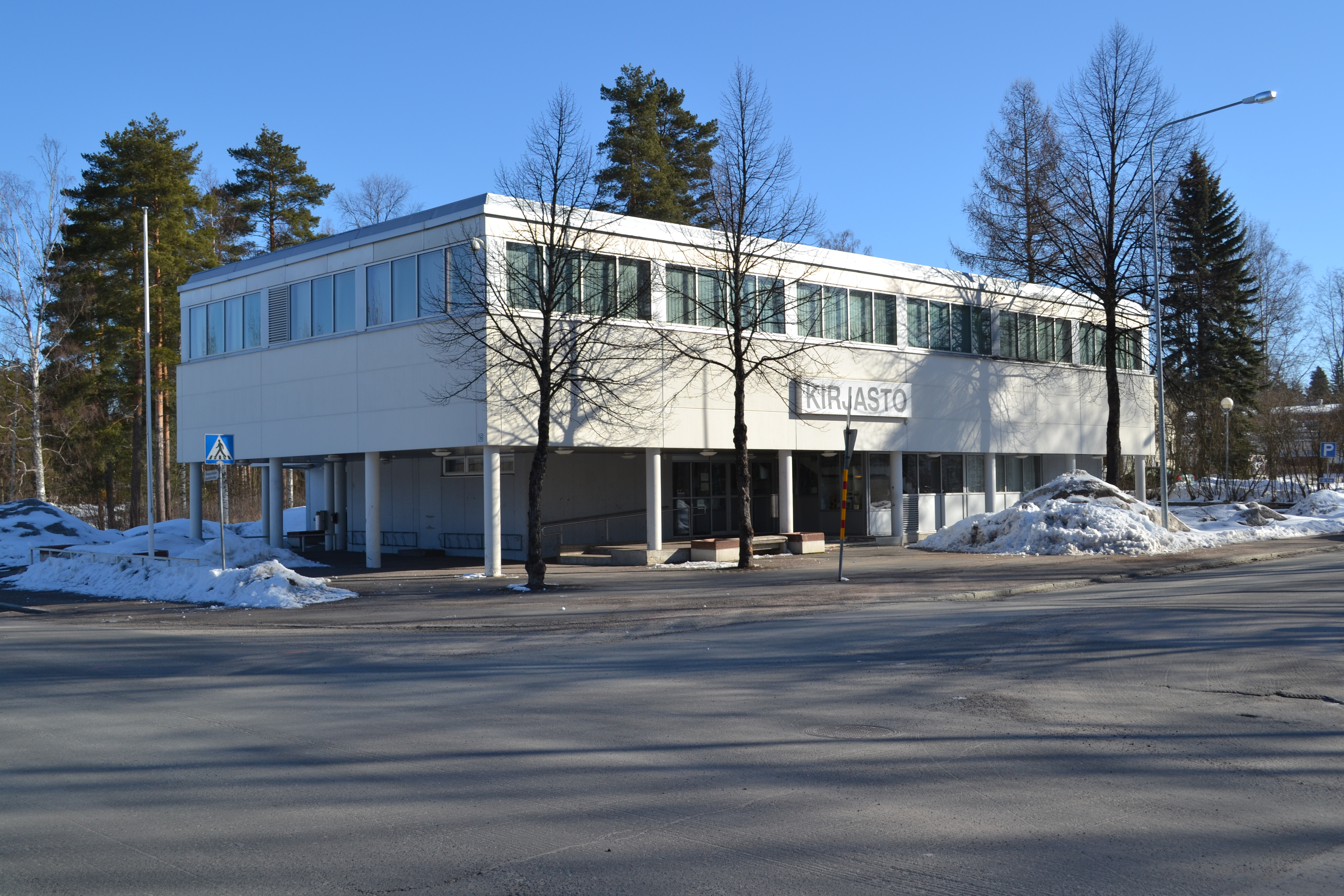 Mäntän kirjasto